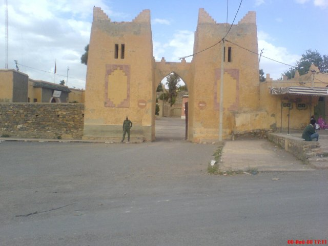 Portail du cercle d'Assoul